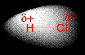 Polání vazba